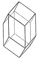 Kombination Prisma 2. Ordnung mit Rhomboeder